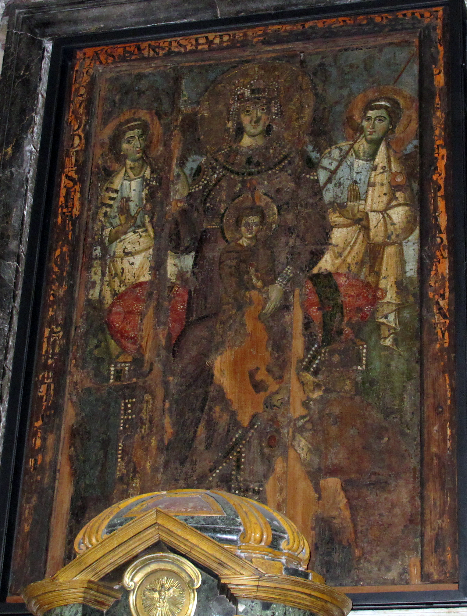 Santa Maria in Trastevere, Roma